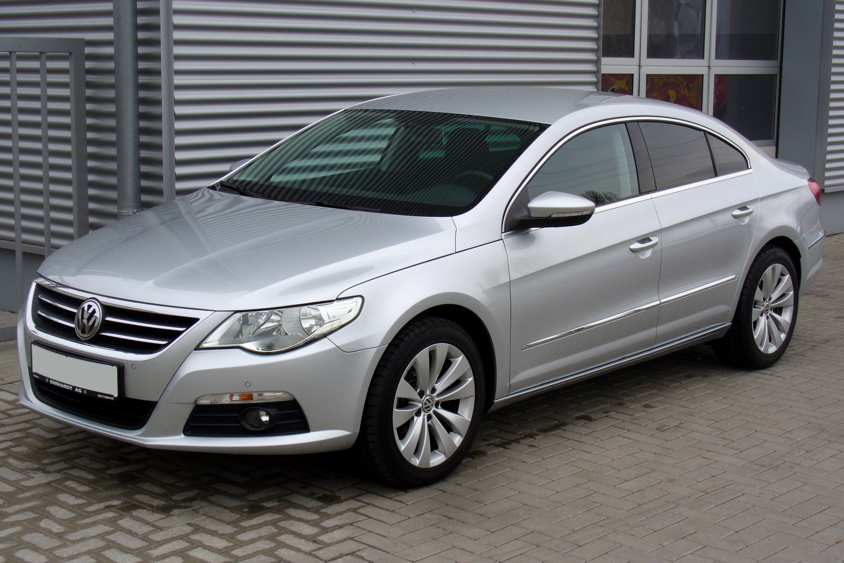 VW Passat CC